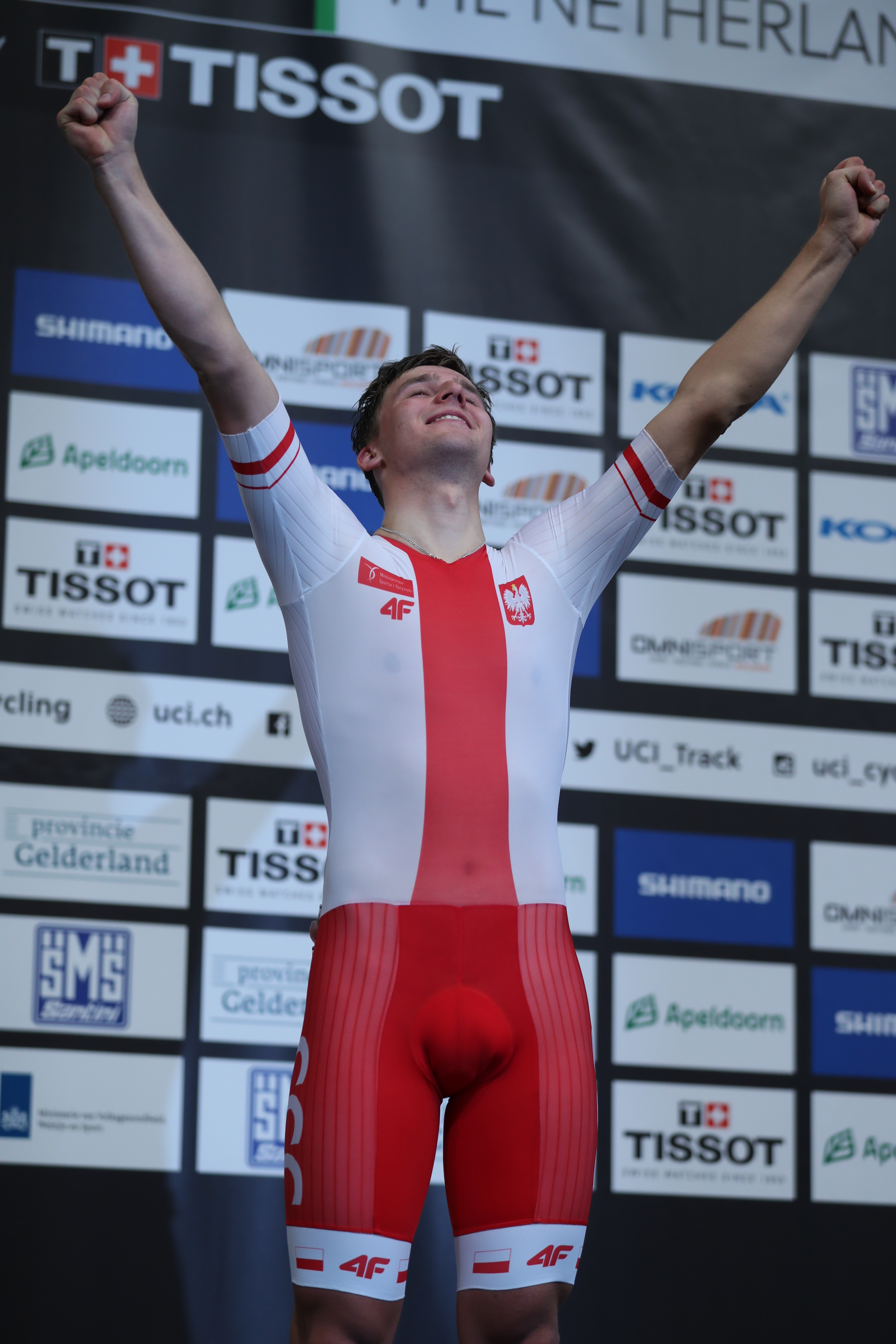 Szymon Sajnok, polnischer Radsportler - Weltmeister im Omnium